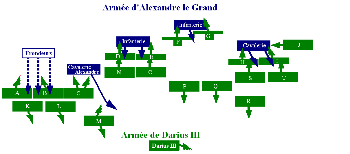 Bataille_de_Gaugamèles_6.